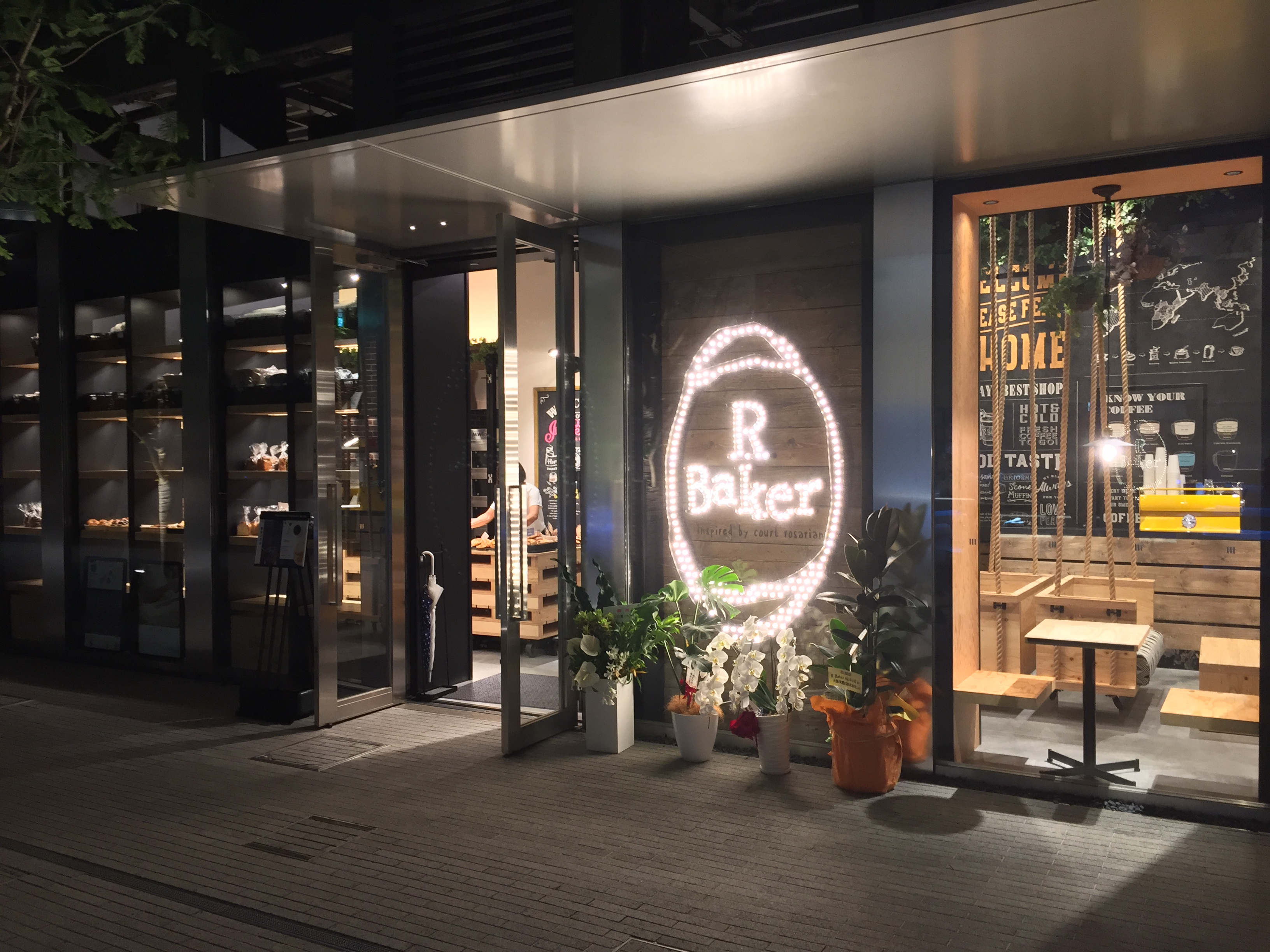 横浜野村ビルの北西側（横浜ブルーアベニュー側）に2017年6月オープンしたベーカリーカフェ「R Baker」、日没後の様子。この店舗のみビルの低層部（1階部）でなく、別棟（独立した建物）となっている。